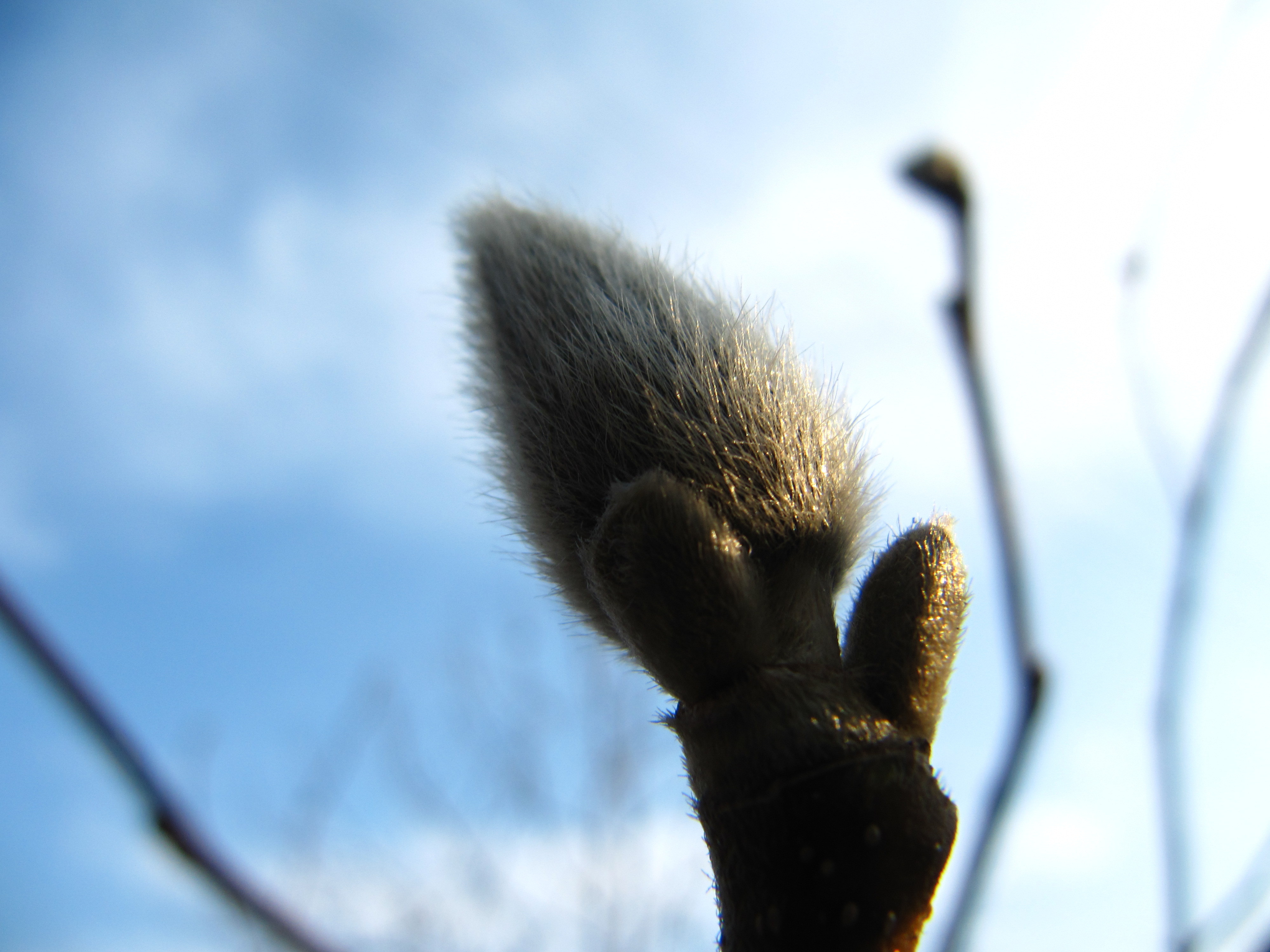 Брунька рододендрона